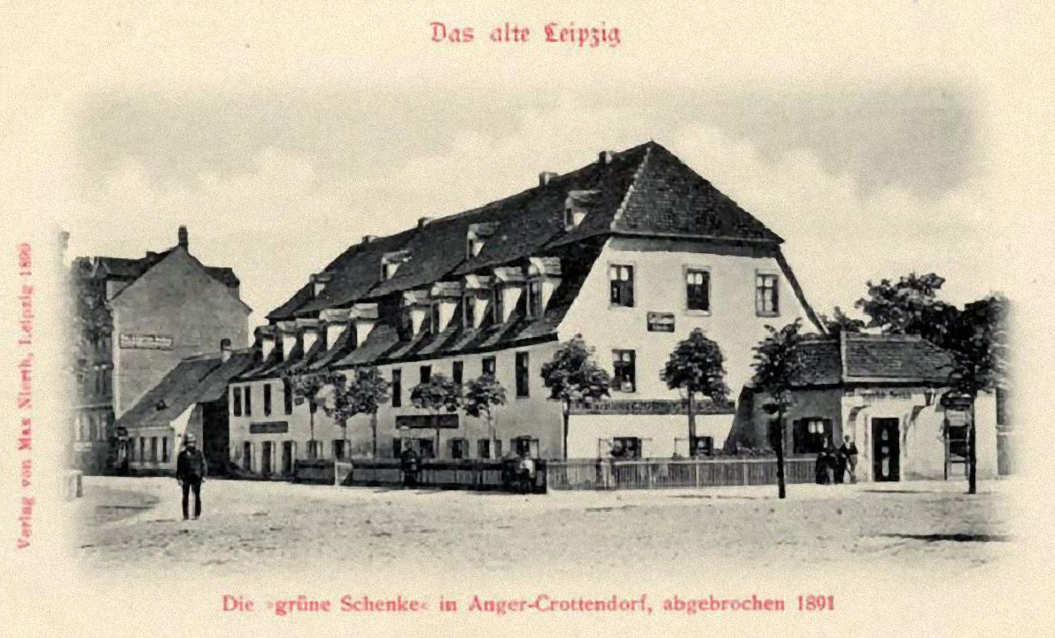 Die Grüne Schenke in Leipzig vor ihrem Abriss 1891